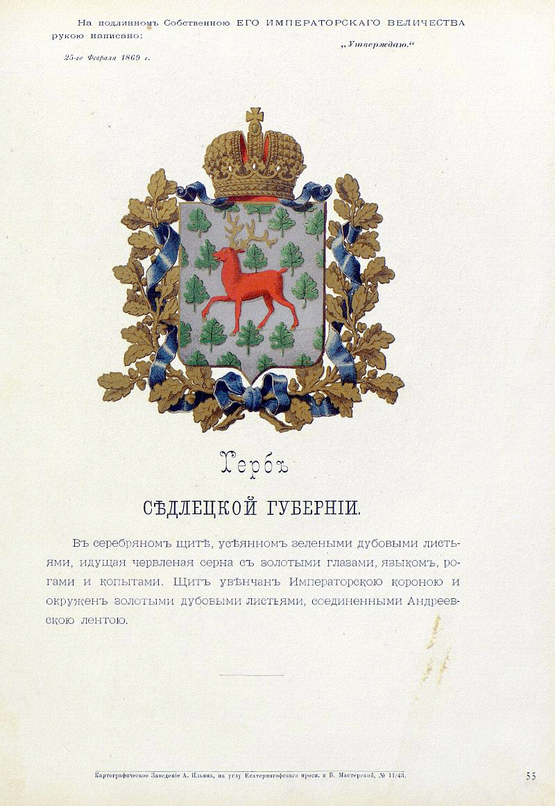 Official Russian Empire coat of arms Sedletz Governorate. Герб Российской Империи Седлецкой губернии с официальным описанием в Гербовнике Бенке. Утверждён Императором Всероссийским Александром Вторым.